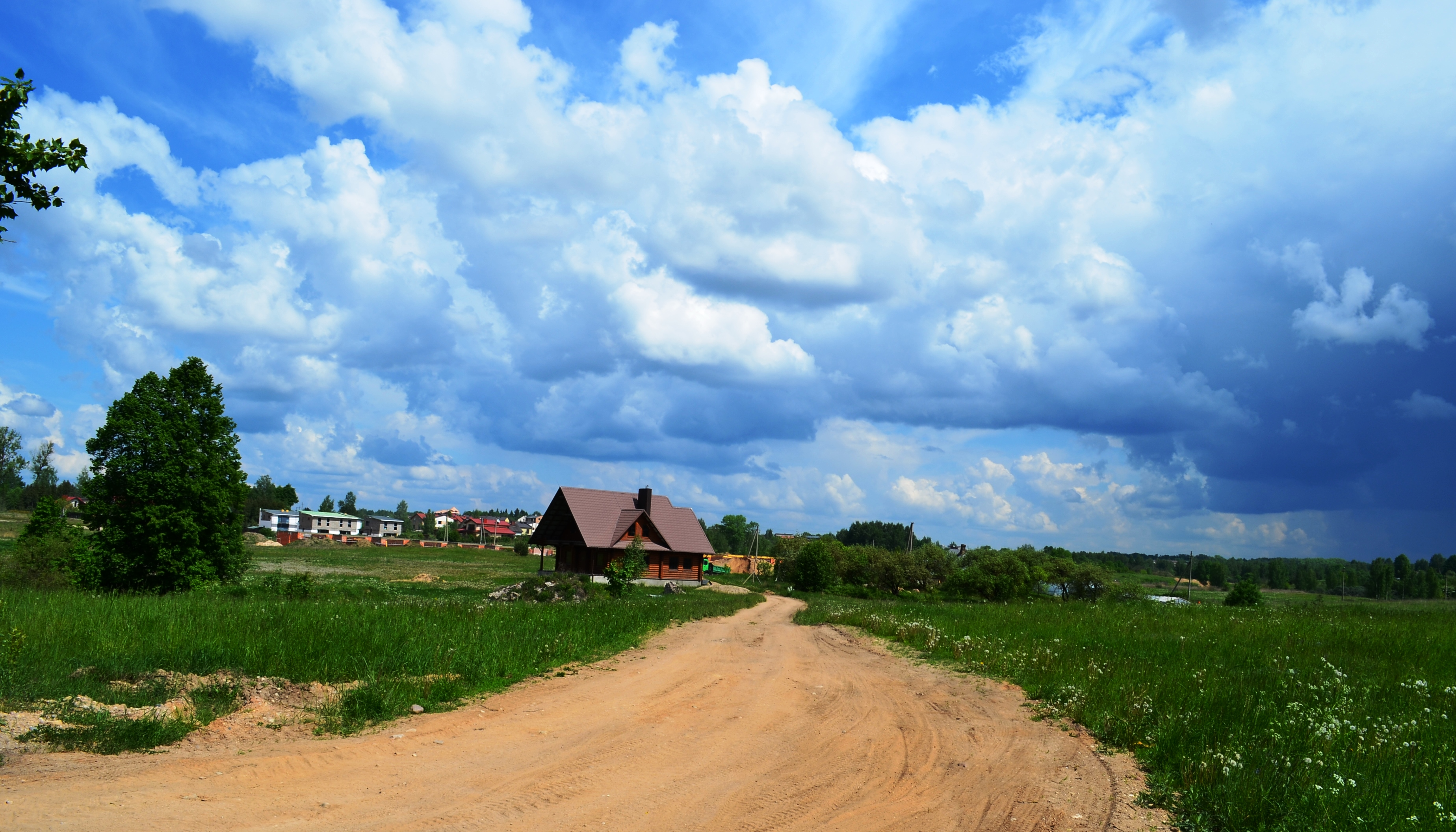 Varnė, Pilaitės sen., Vilnius